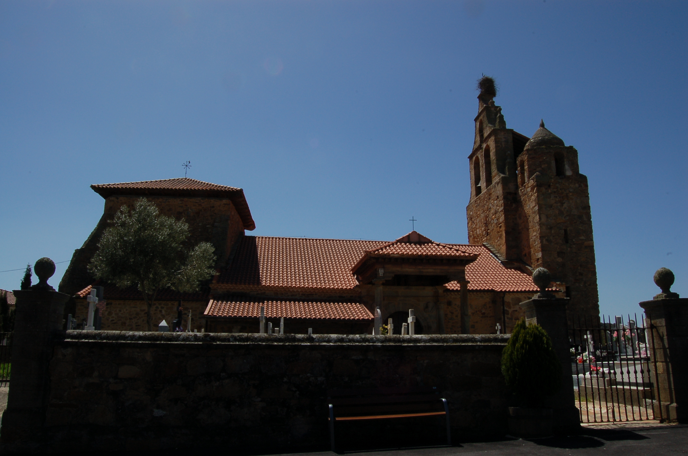 Igrexa de Fuente Encalada